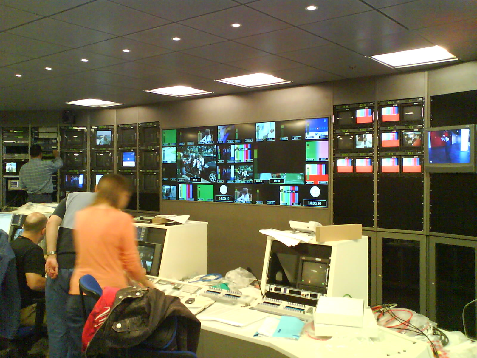 Control central de la nueva sede de ETB en Bilbao (Vizcaya, País Vasco (España))